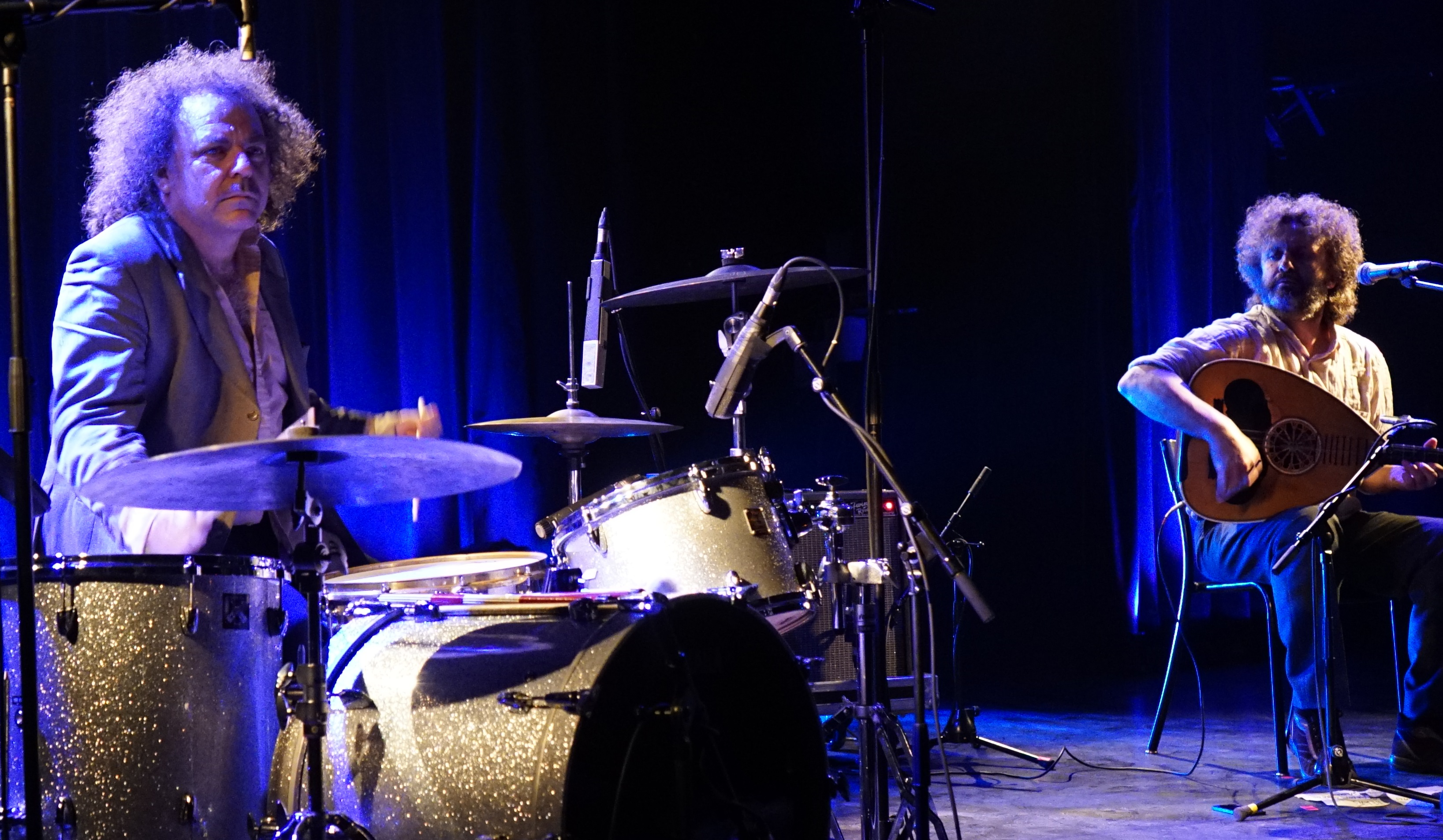 en concert à la Cartonnerie de Reims.